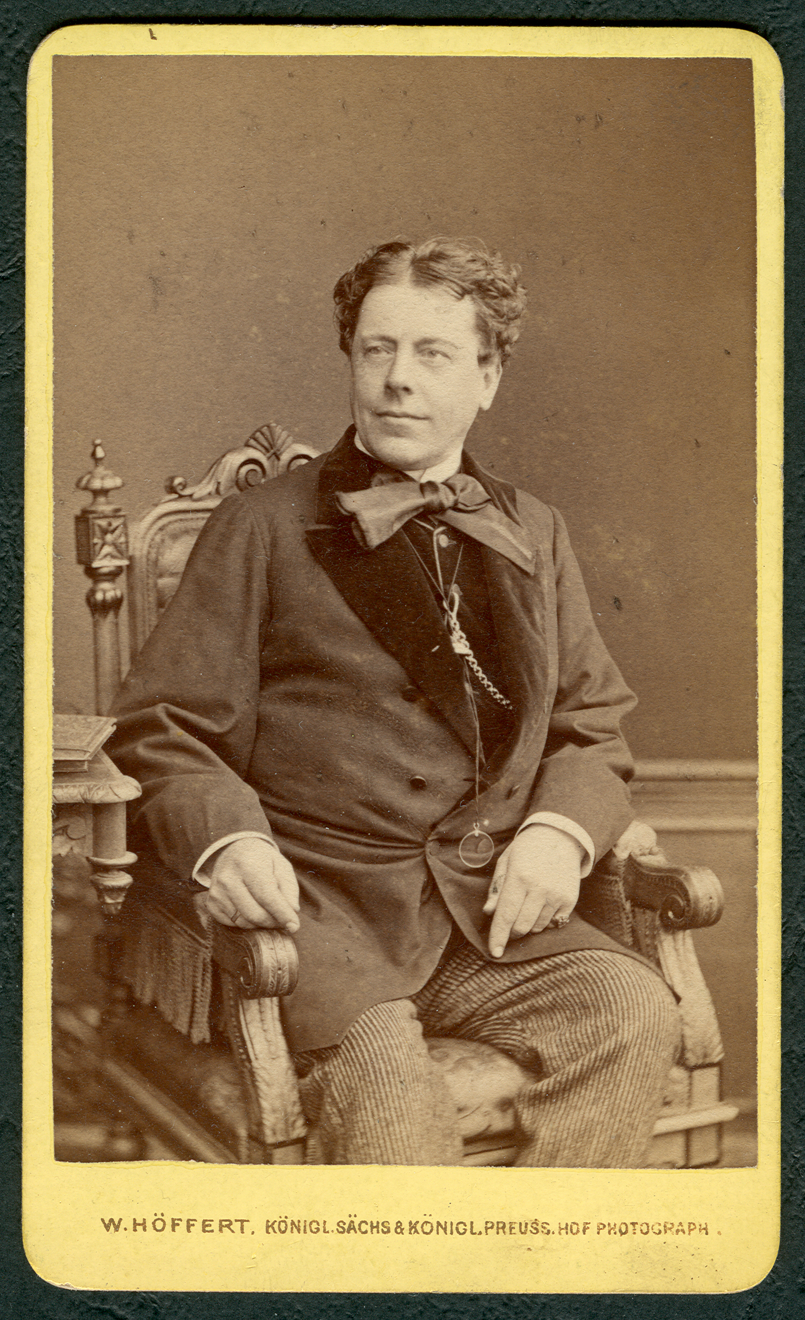 Carte de Visite des Schauspielers Carl Mittell, gewidmet dem Theaterkritiker und Autor "Herrn Doctor Max Kurnik zur freundlichen Erinnerung" in Breslau (polnisch: Wrocław), 10. Februar 1877.